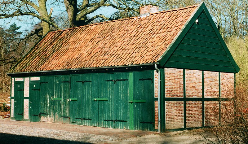 Uetersen / Germany --Remise in Langes Tannen -- Coachhouse in "Langes Tannen"